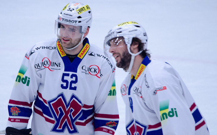 _DSC4893.jpg